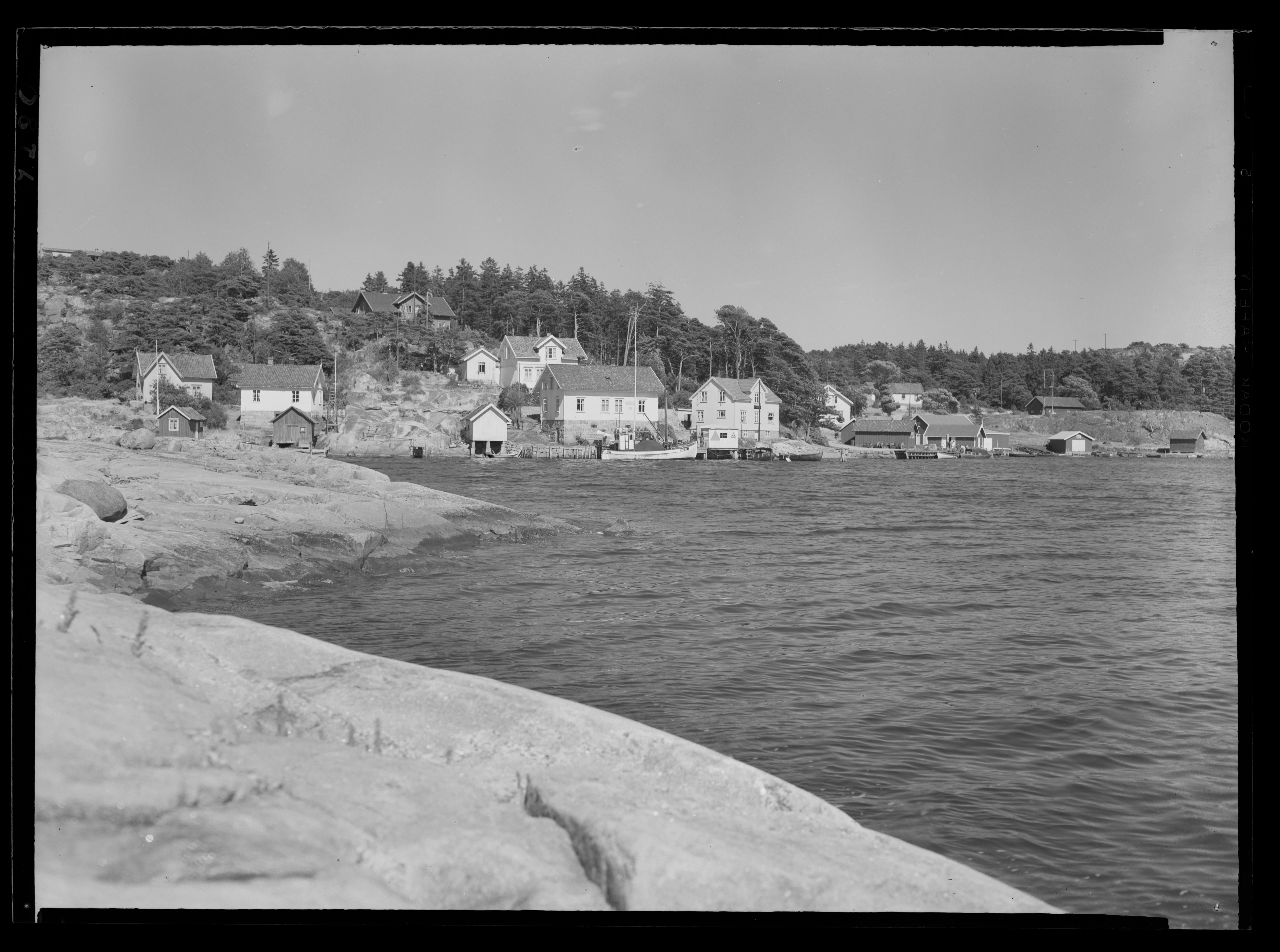 Bildet er hentet fra Nasjonalbibliotekets bildesamling. Anmerkninger til bildet var: Fotograf:Ukjent Bølingshavn,Kirkøy, Hvaler, Østfold